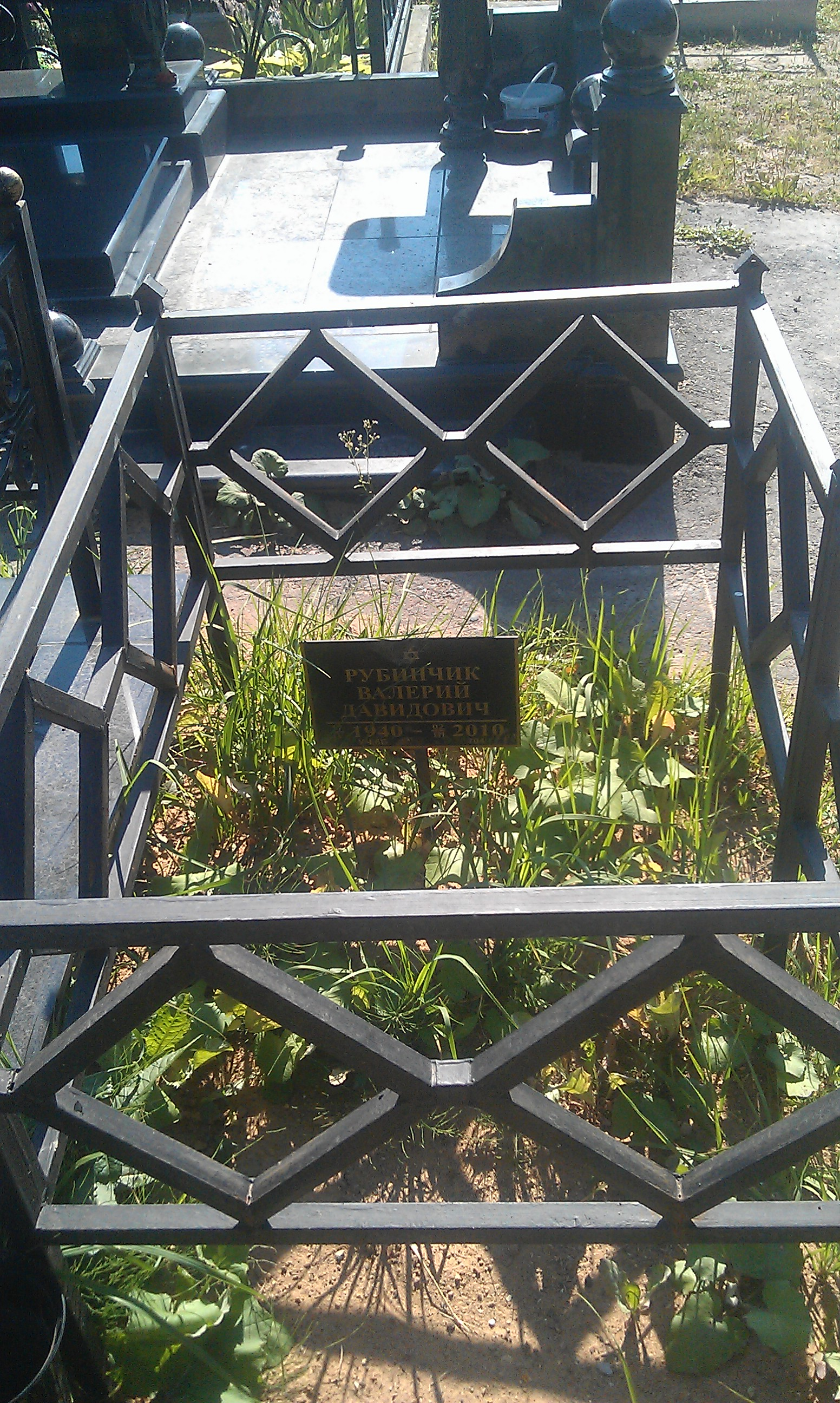 Могила режиссёра Валерия Рубинчика